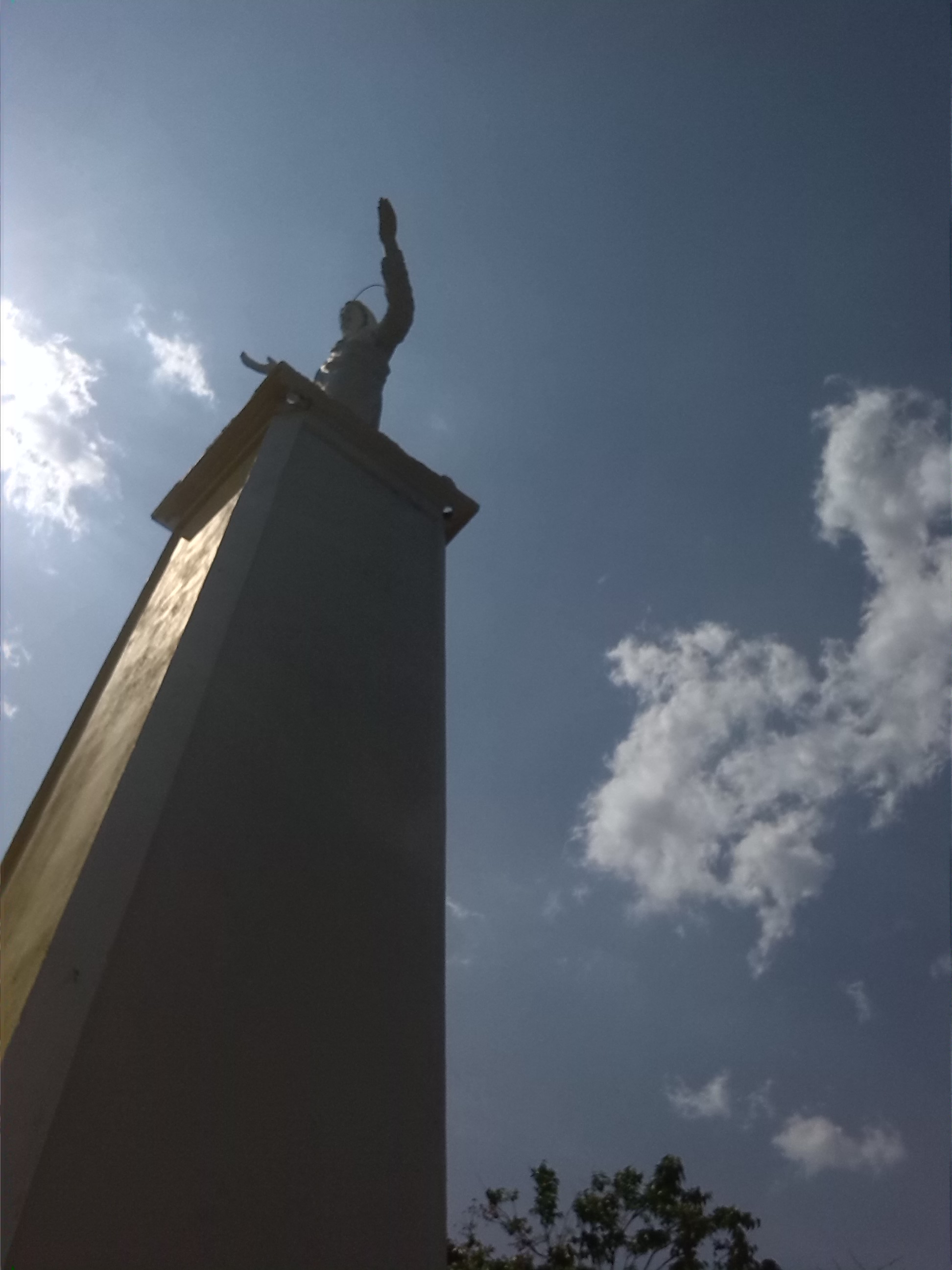 paisaje